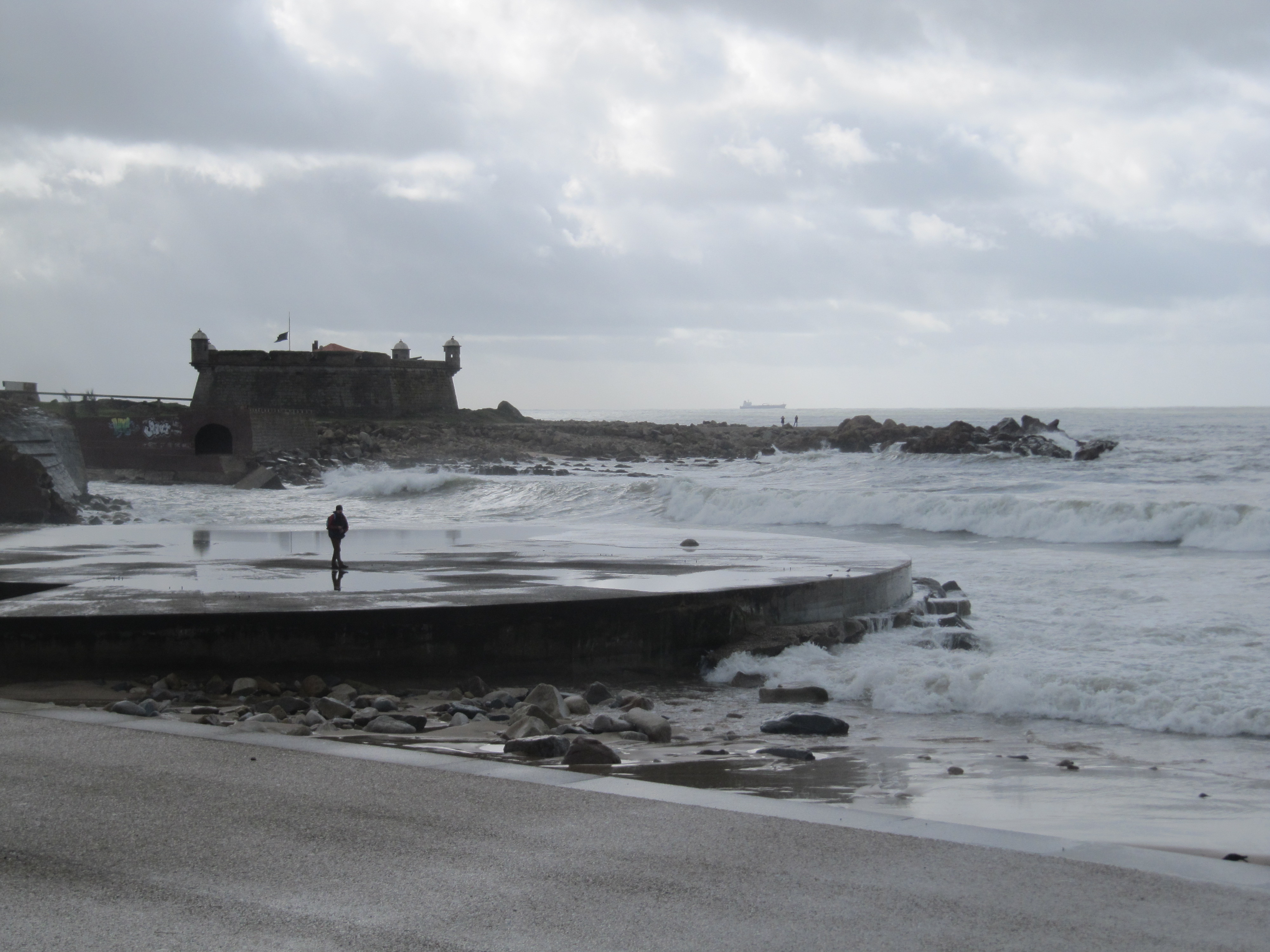 Blick auf Castelo do Queijo